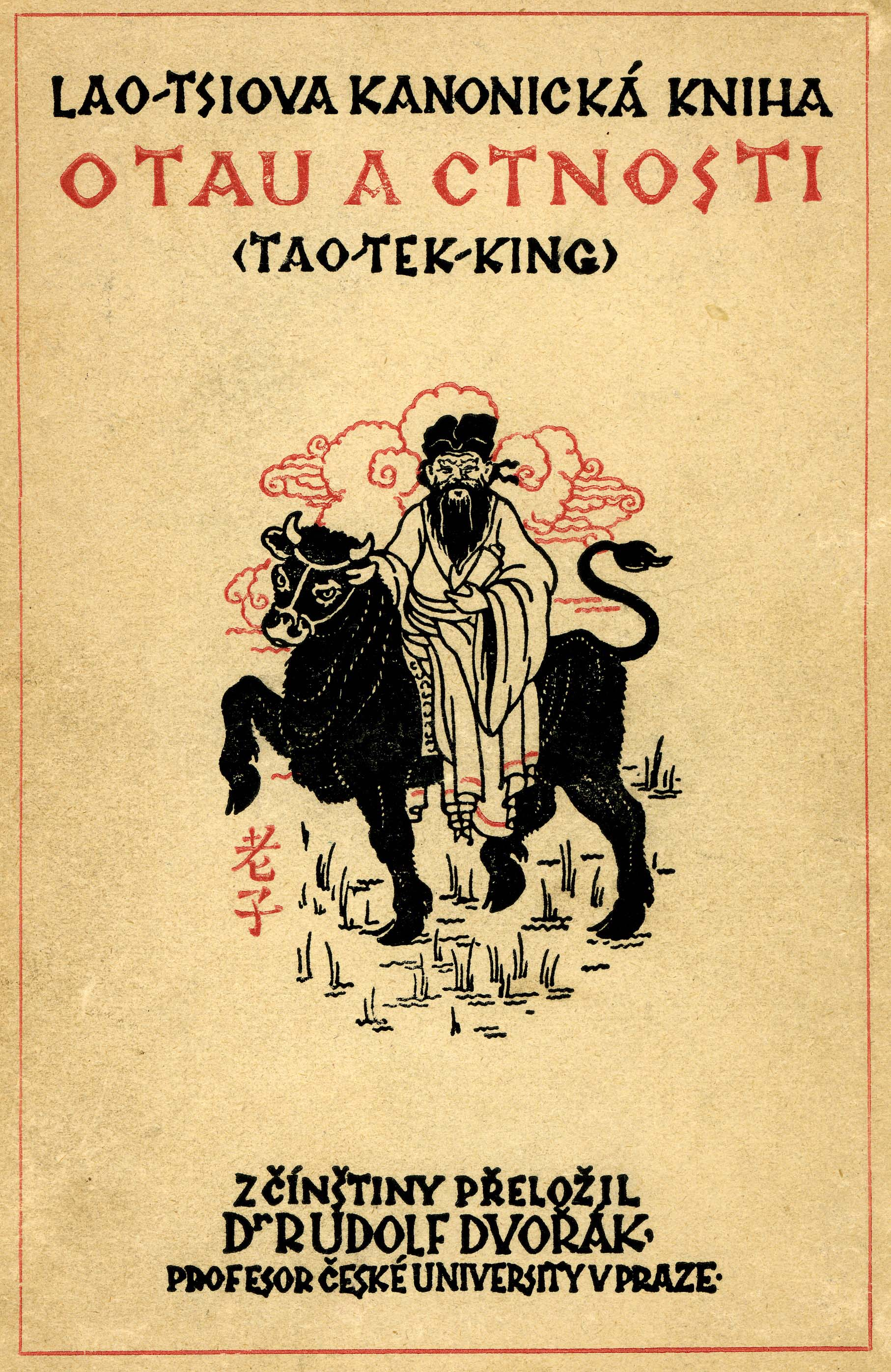 O Tau a ctnosti - obálka českého vydání 1920.